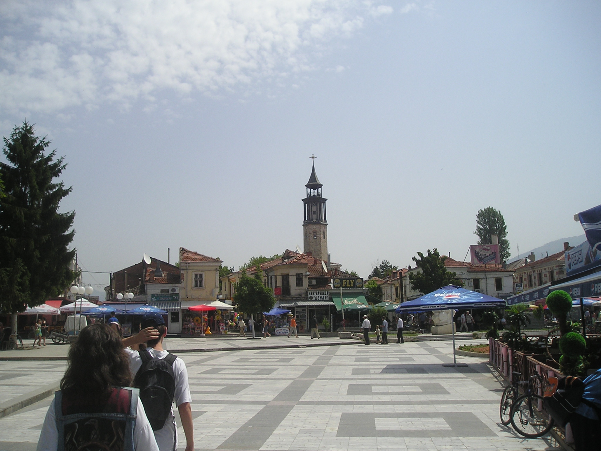 Чаршијата и Саат-кулата.